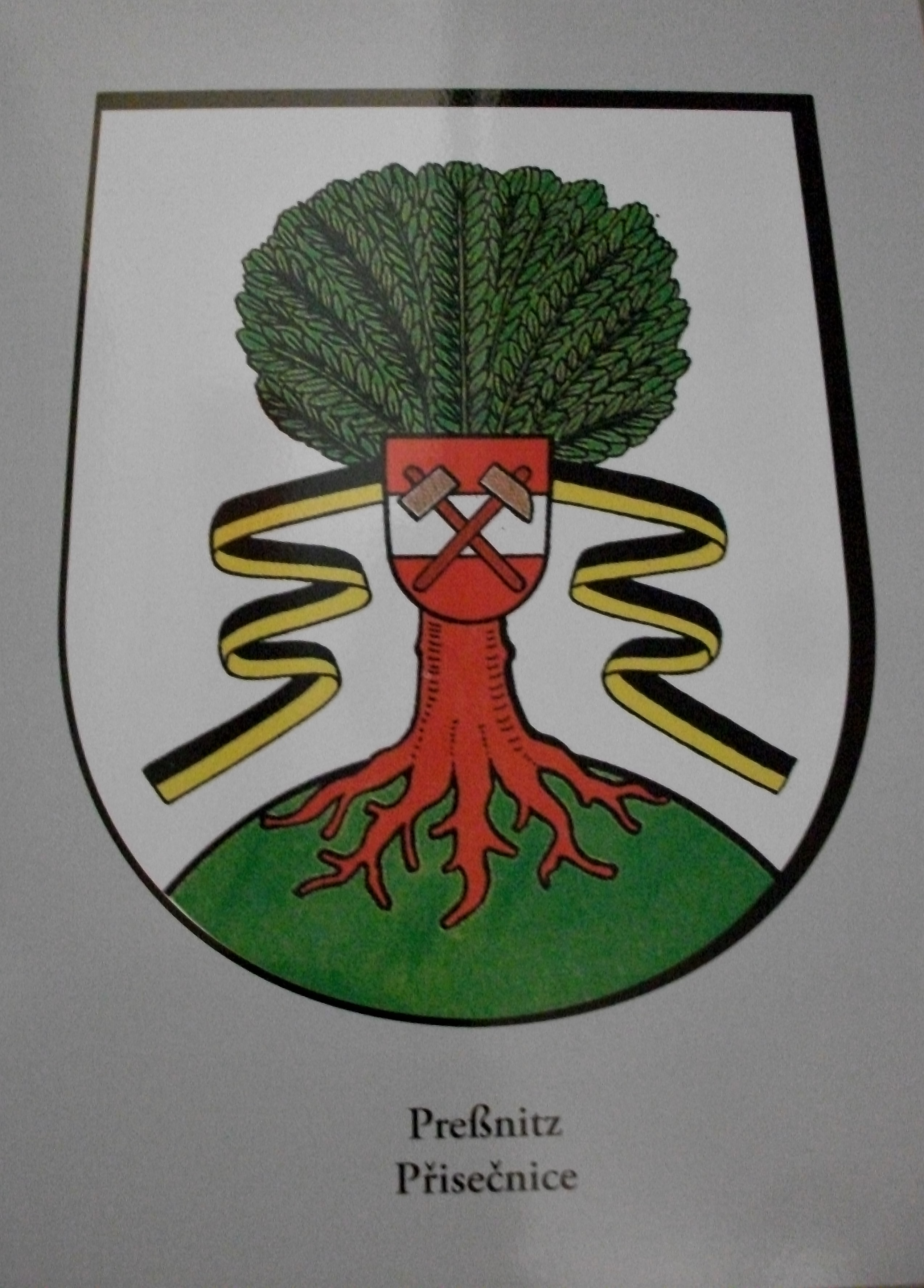 Ehemaliges Ortswappen der Stadt Preßnitz (Přísečnice)